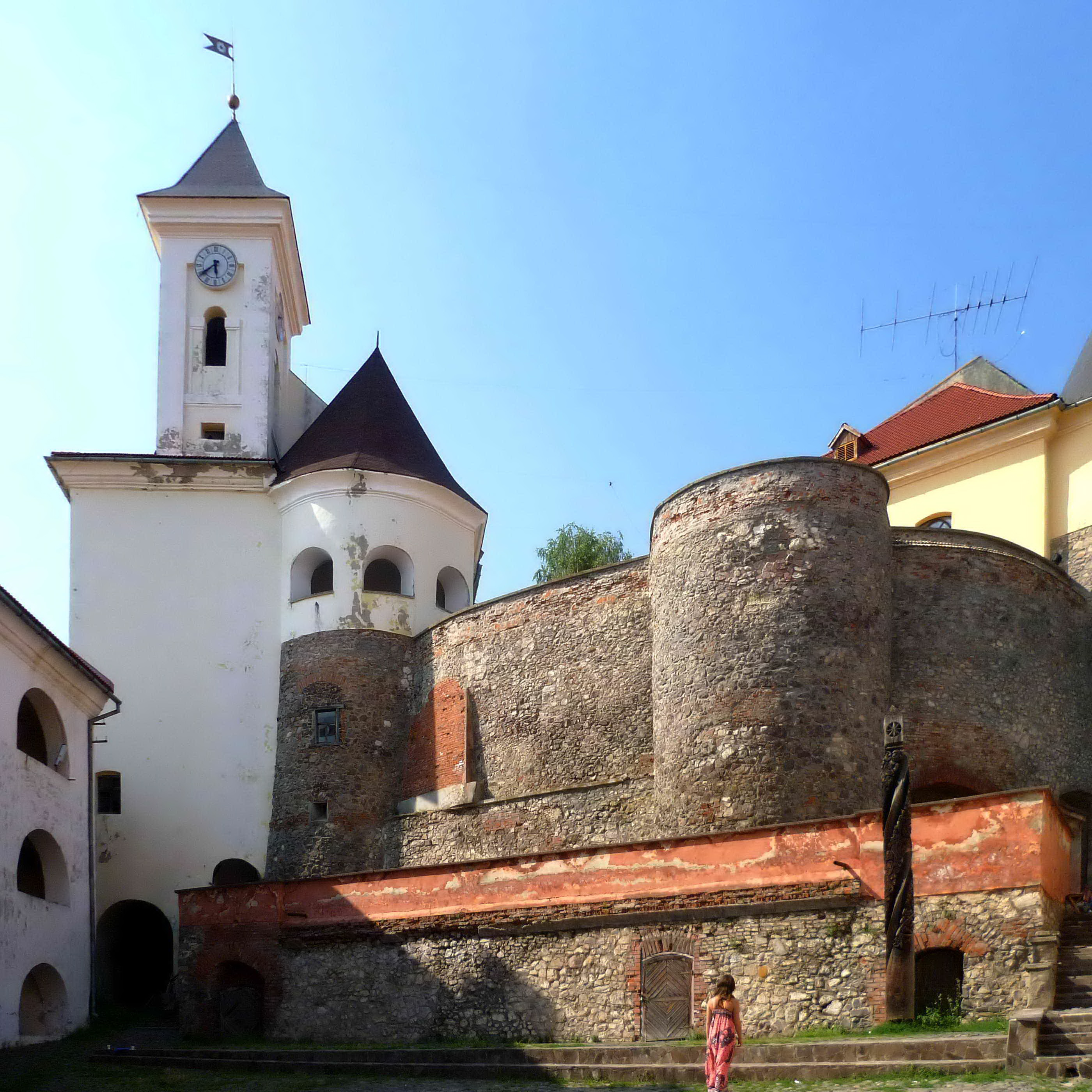 Замок "Паланок" (14-18 ст.) - м.Мукачеве (Замкова гора) Закарпатська область Україна